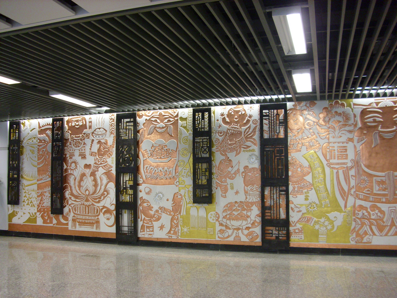 南京地铁2号线 苜蓿园站主题文化墙